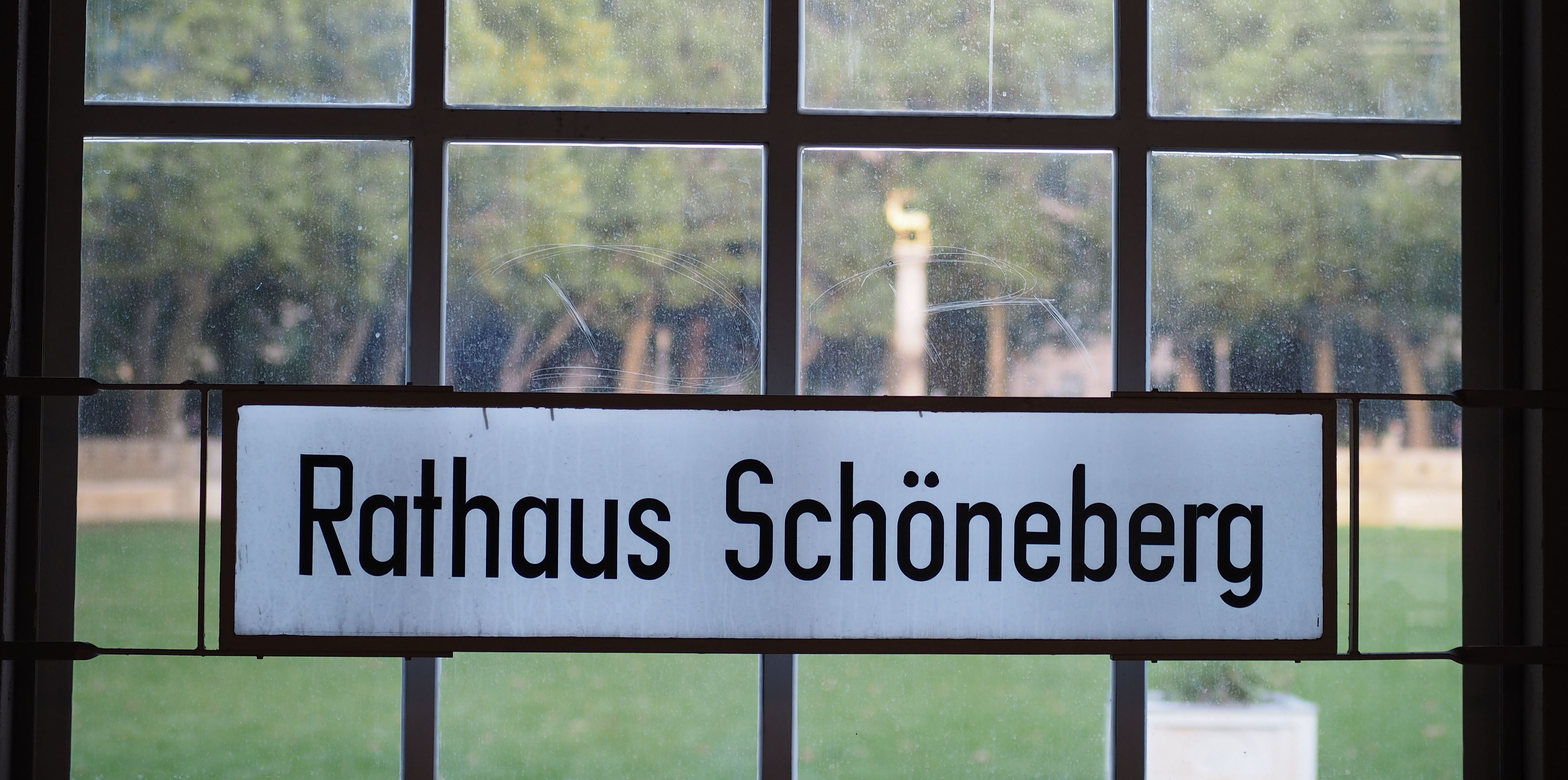 Namensschild in einem Fenster des U-Bahnhofs Schöneberg in Berlin.